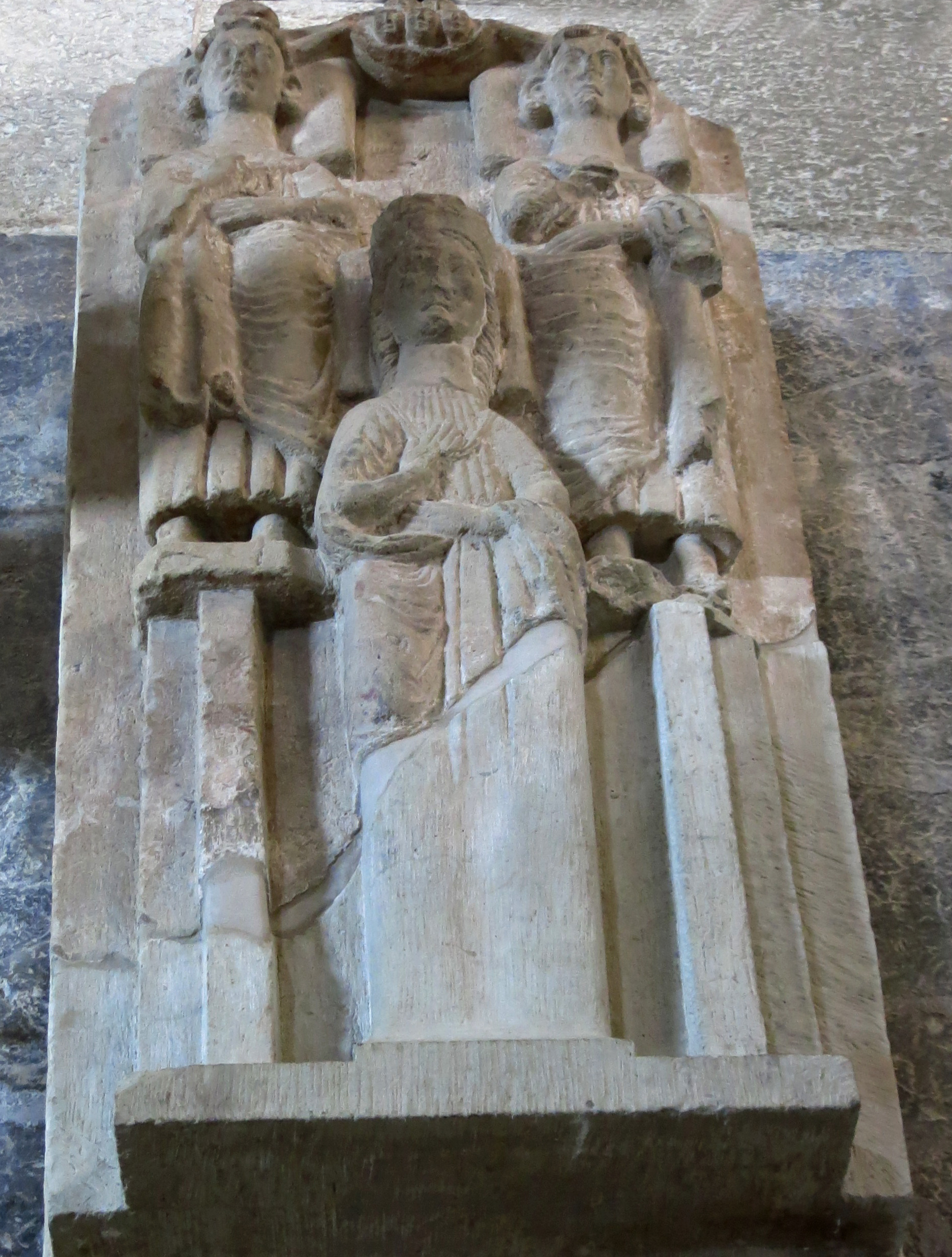 Mechtildstenen. Tomb of Birger Jarl (d. 1236), Mechtild (d. 1288) & hertig Erik (d. 1275)